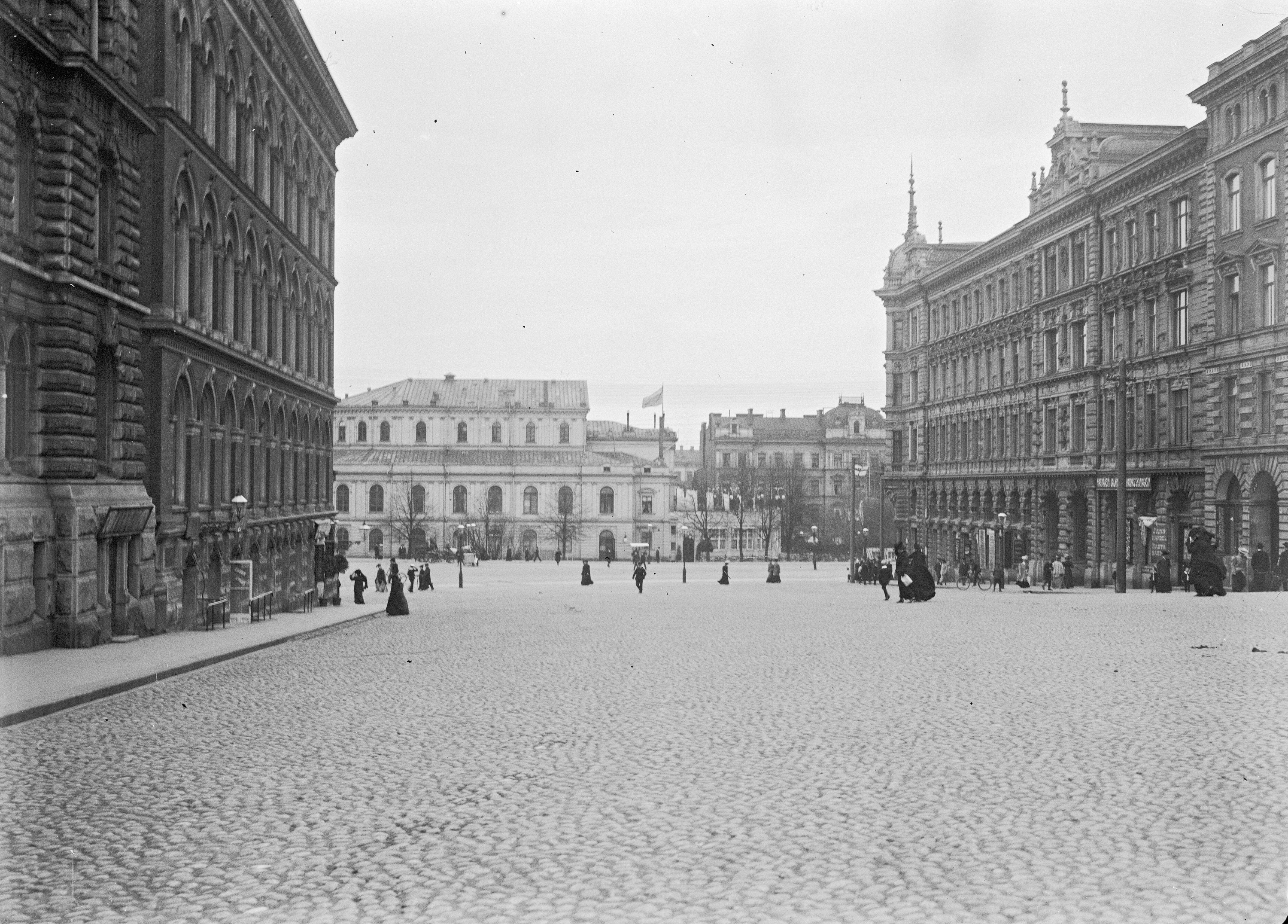 Skillnadsgatan mot Svenska Teatern. Foto Gustaf Sandberg. sls1849_202 Ur boken Helsingfors i ord och bild Utgiven av Svenska litteratursällskapet i Finland, 2012